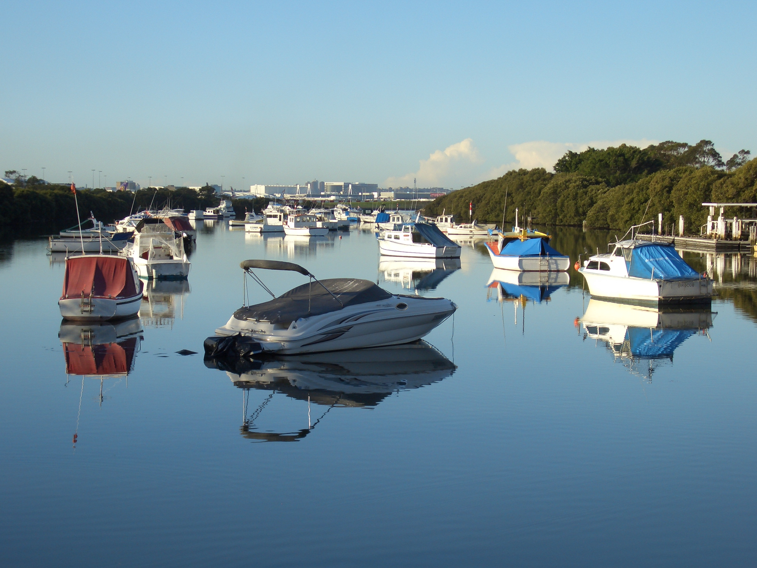 Kyeemagh, Sydney